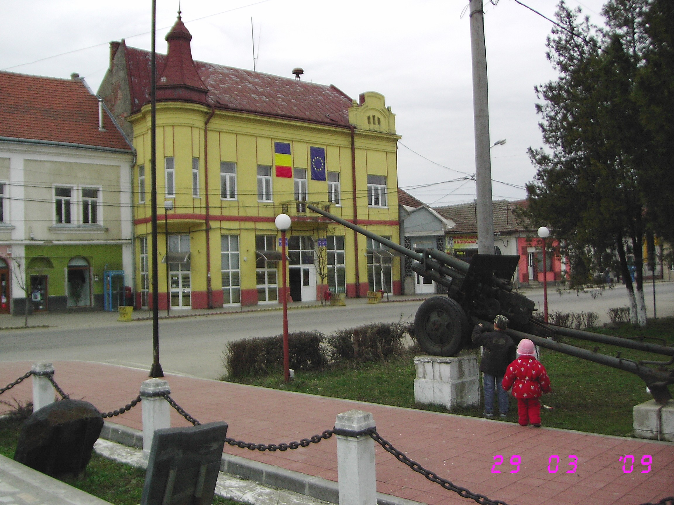 Primaria Seini